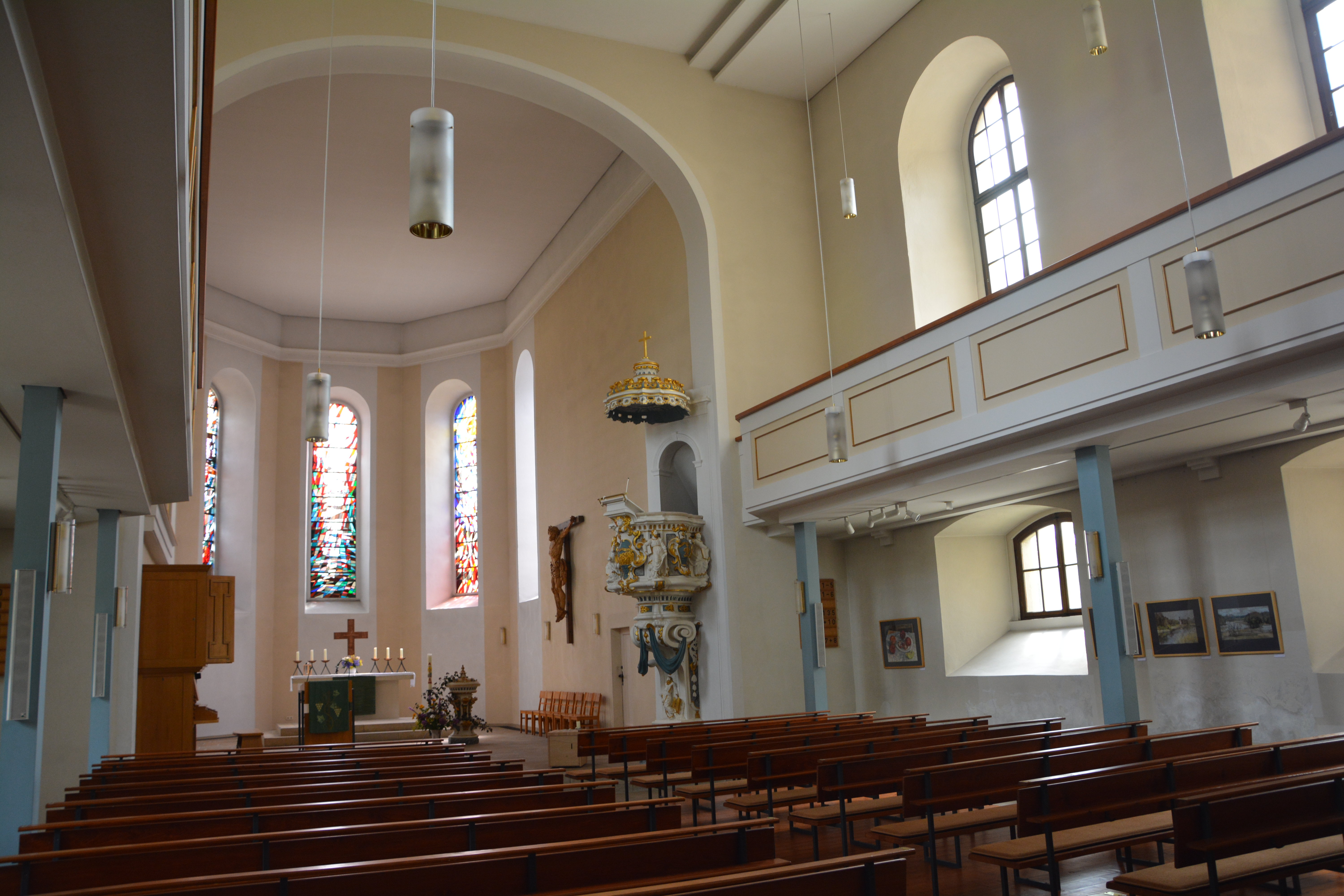 Stadtkirche "Zum Heiligen Namen Gottes" Radeberg, Innenansicht